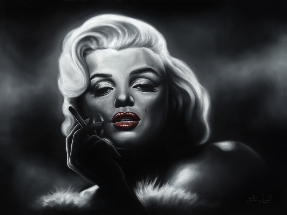 Óleo sobre Lienzo, 60 x 80cm Colección privada.